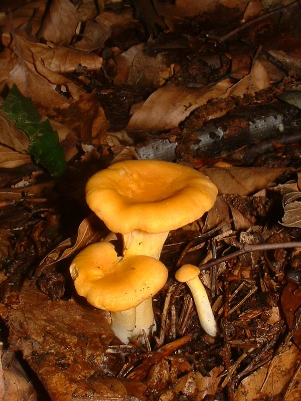 Chanterelle, Neddes, août 2004